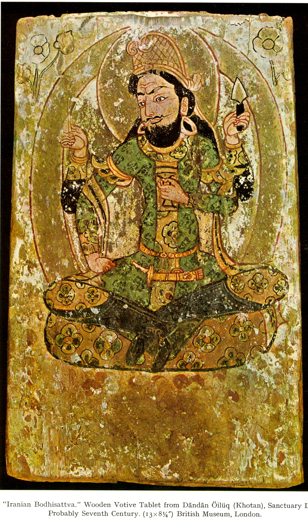 'Iranian_Bodhisattva'_VII_cent